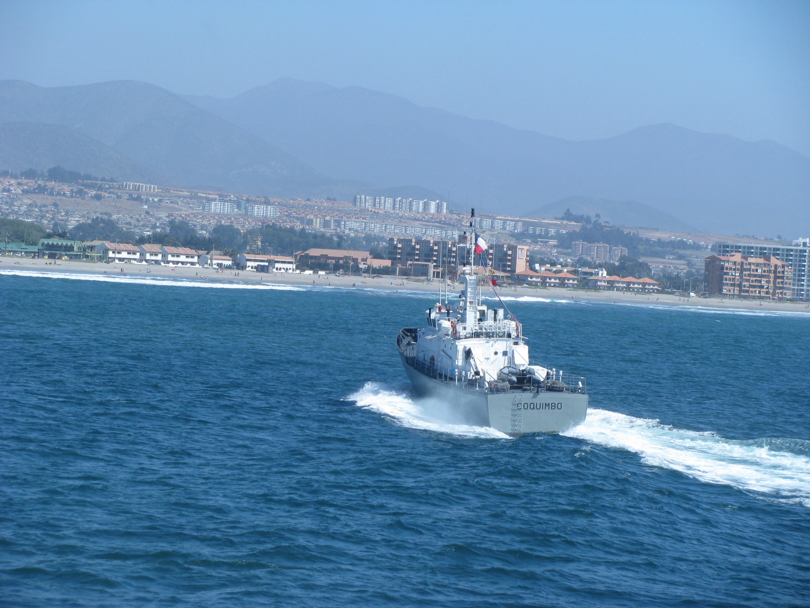 Lsg 1616 Coquimbo frente a playas de la Serena